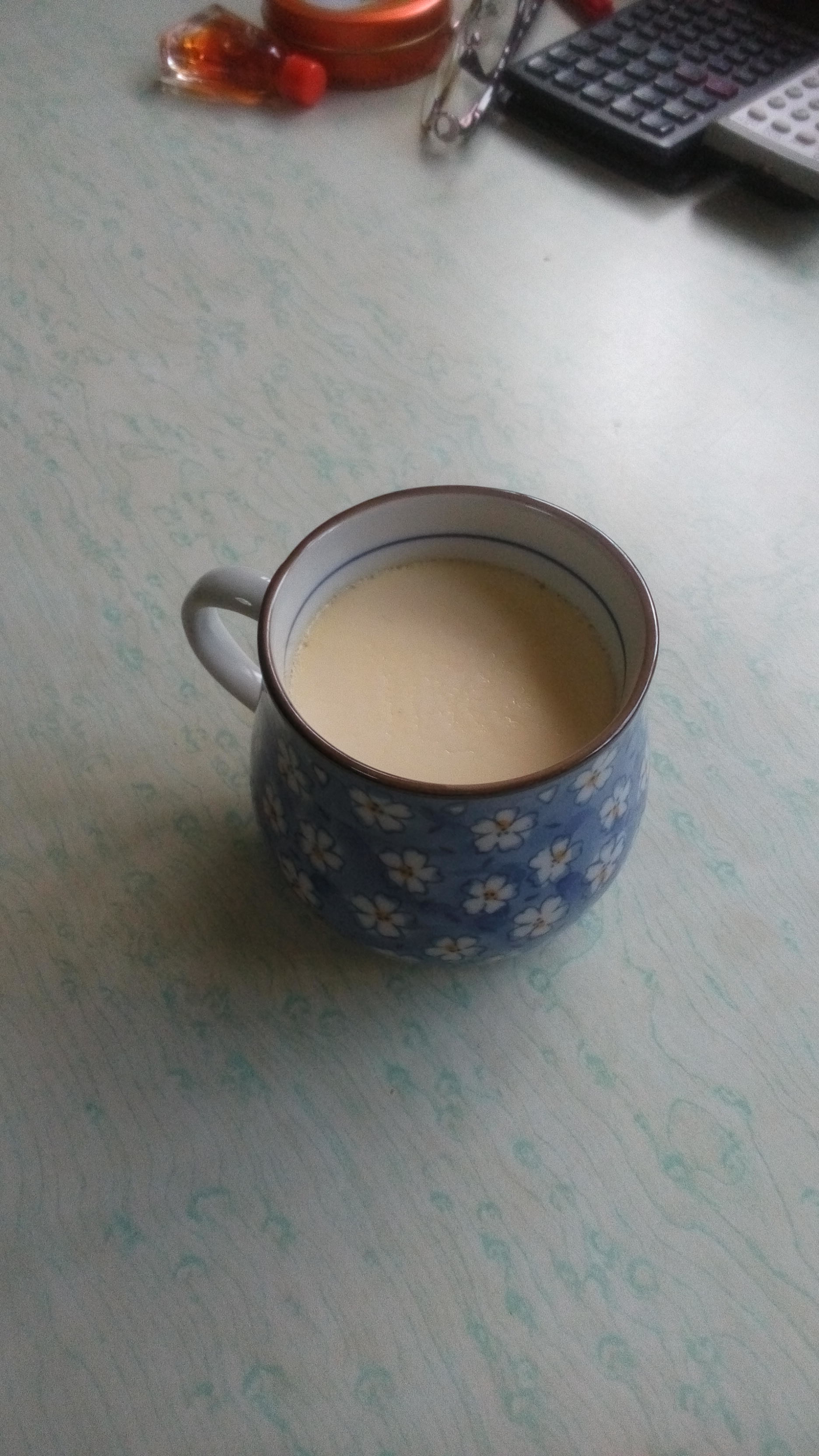 DIY Chawanmushi